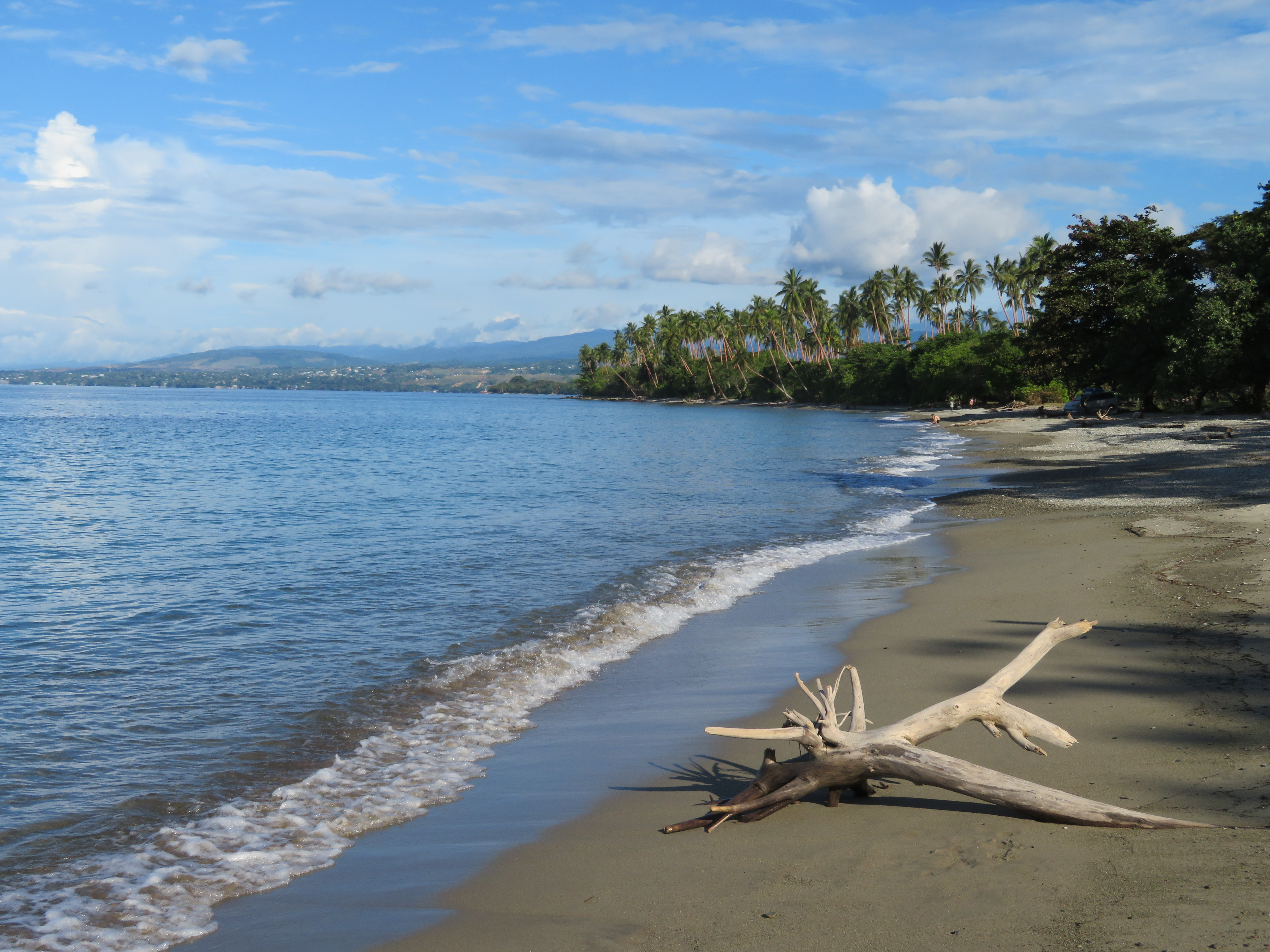 Bonegi Beach, Guadalcanal, Salomonen